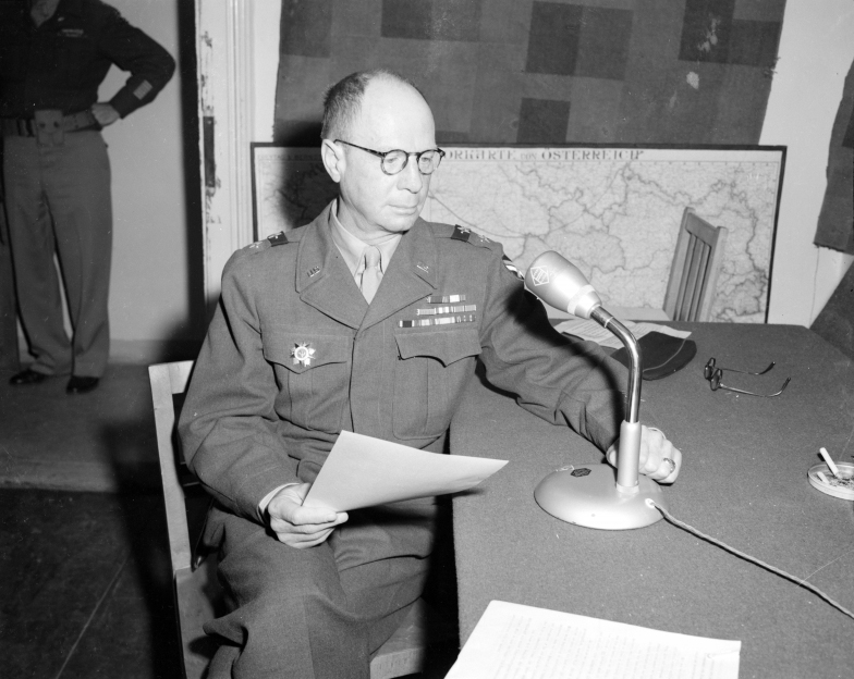 Walter M. Robertson bei seiner Eröffnungsansprache im Salzburger Studio des Senders Rot-Weiß-Rot